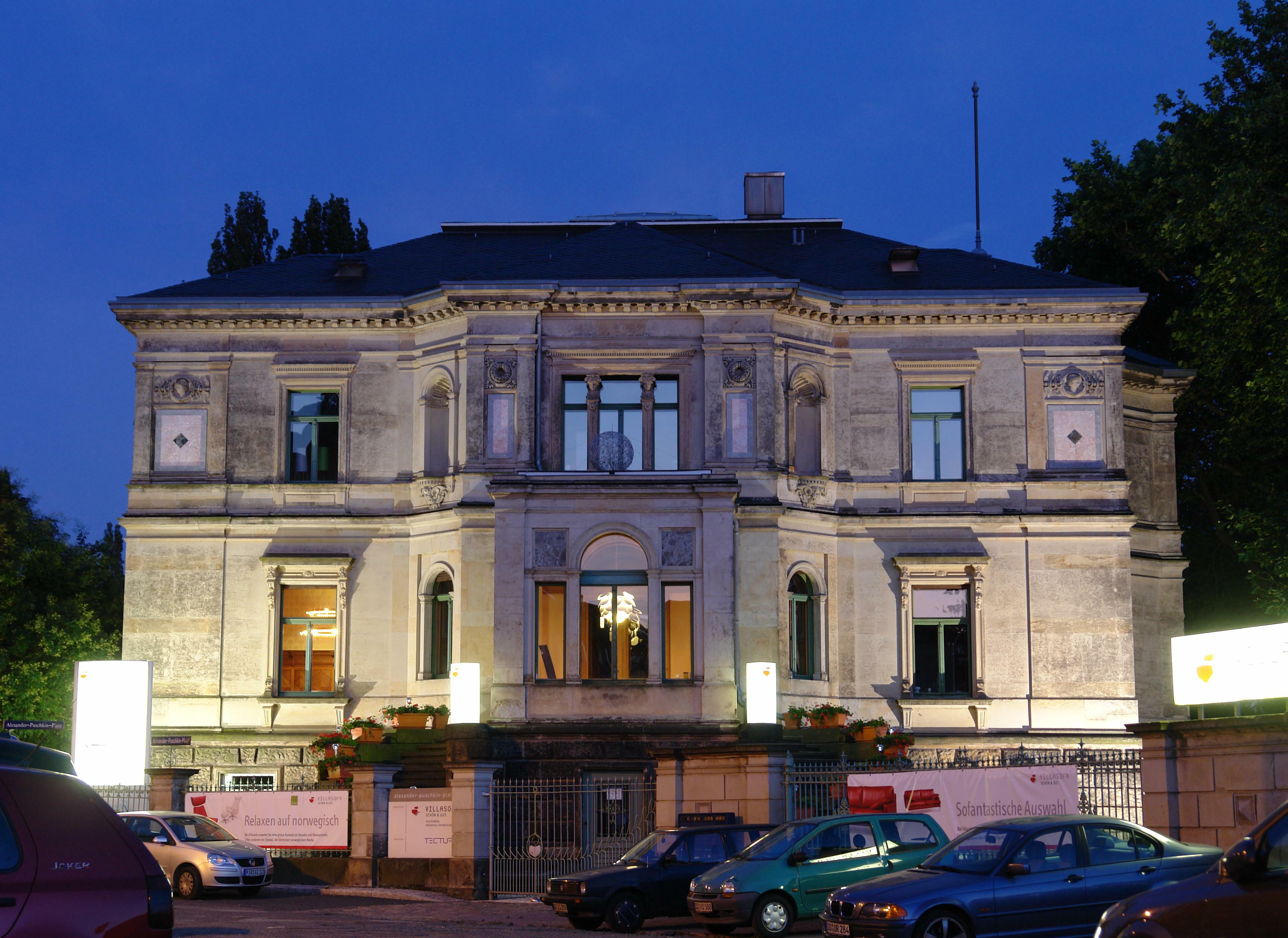 Villa Grumbt (Puschkinhaus) in Dresden